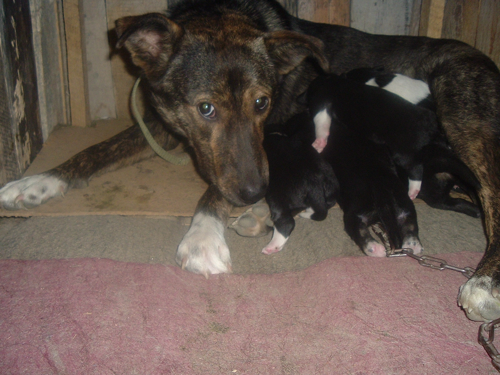 Căţea cu căţeluşi